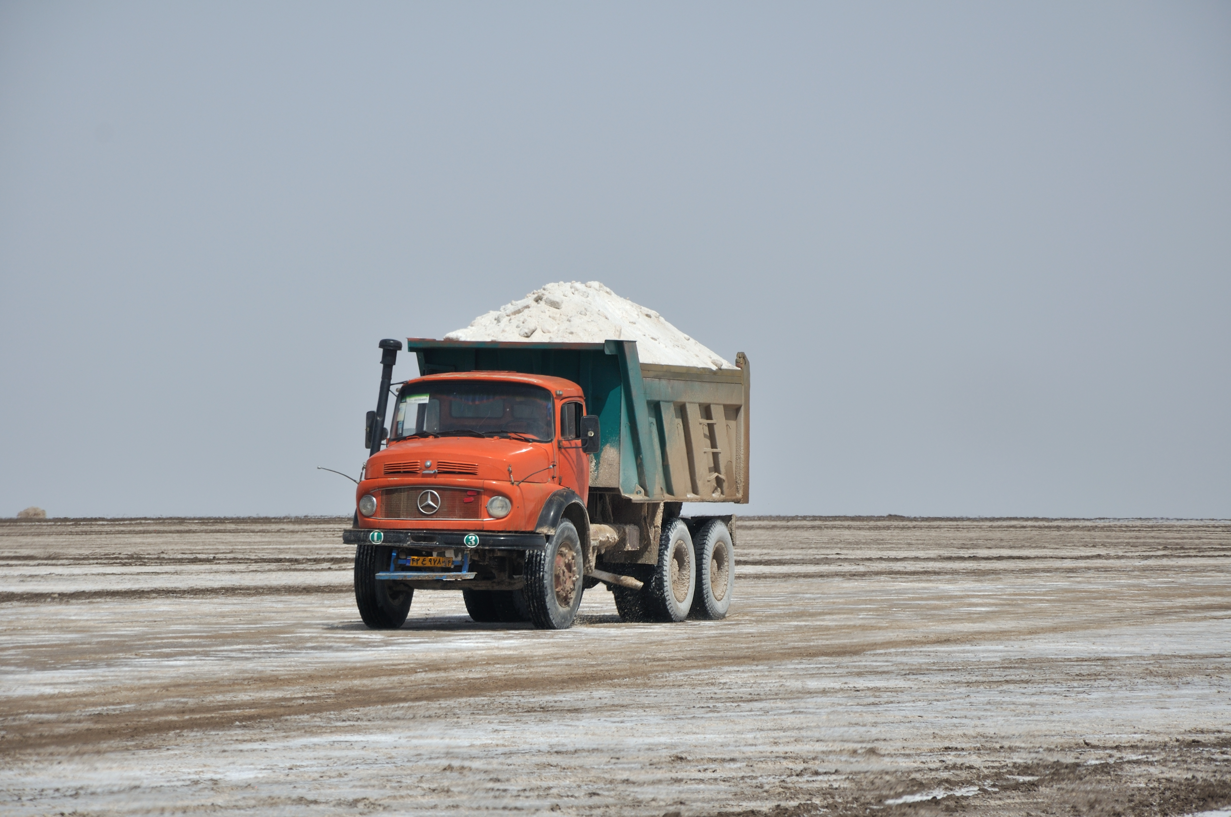 Iran, Namak Lake